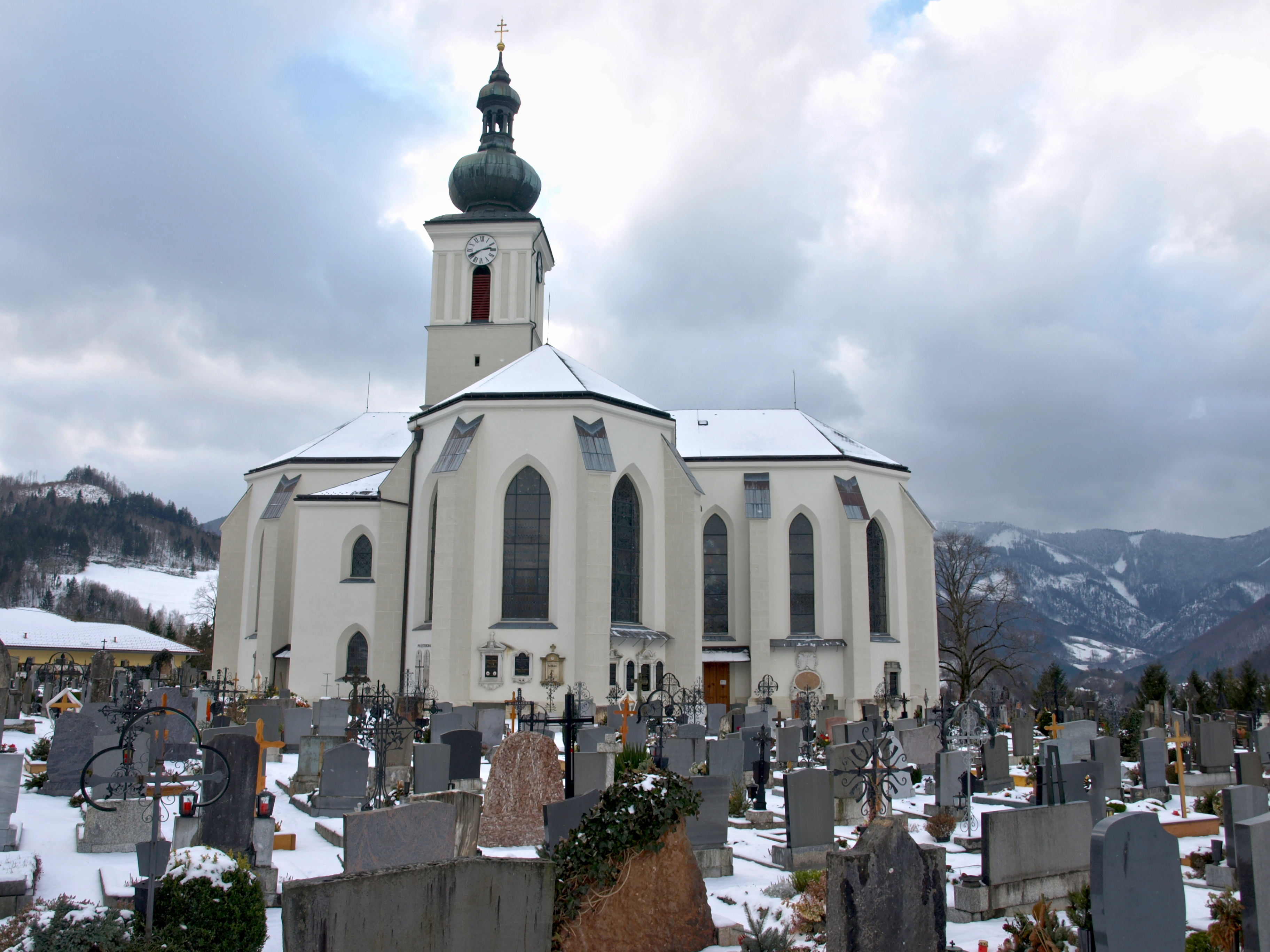 Kath. Pfarrkirche hl. Johannes Evangelista